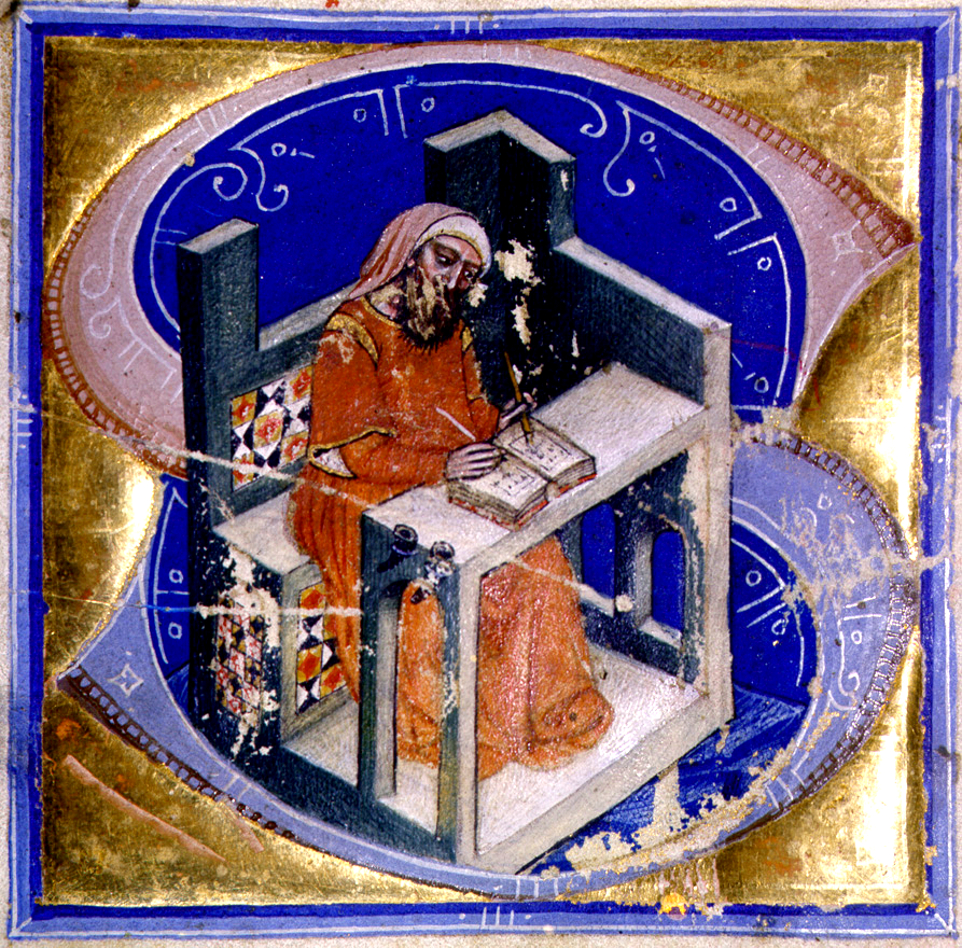 Keretbe foglalt S iniciáléban a történetíró. A kép vagy Mózest, a történetírás tanítómesterét, vagy a feltételezett szerzőt, Kálti Márkot ábrázolja.